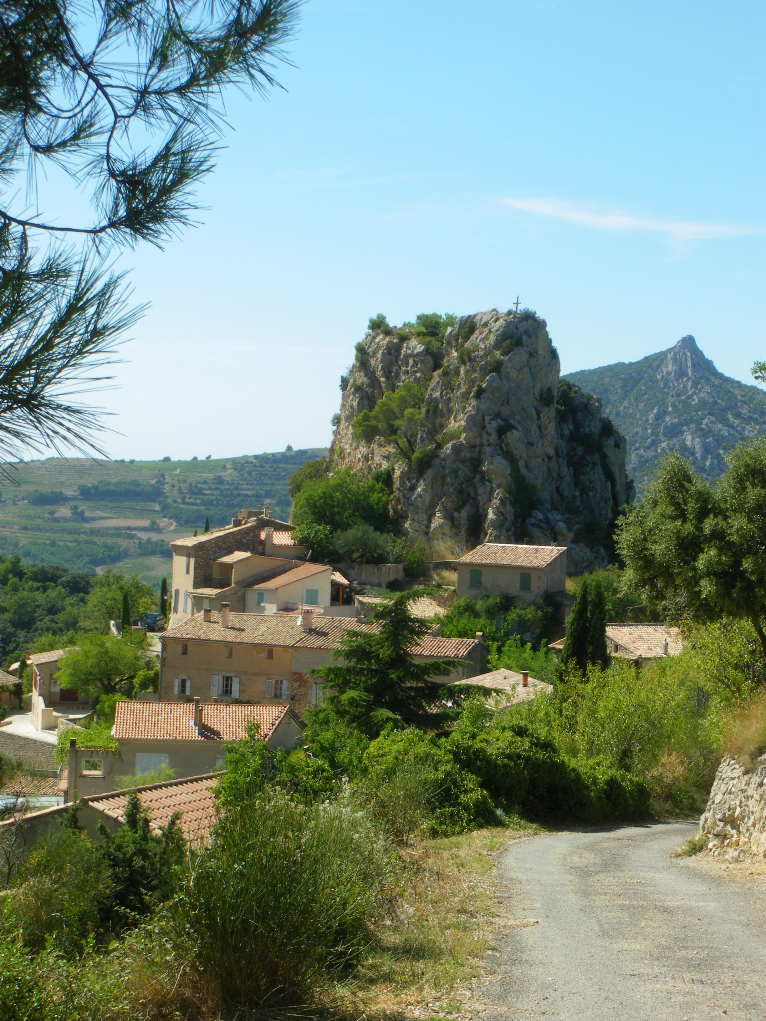 vue du village de La Roque Alric, Vaucluse, France